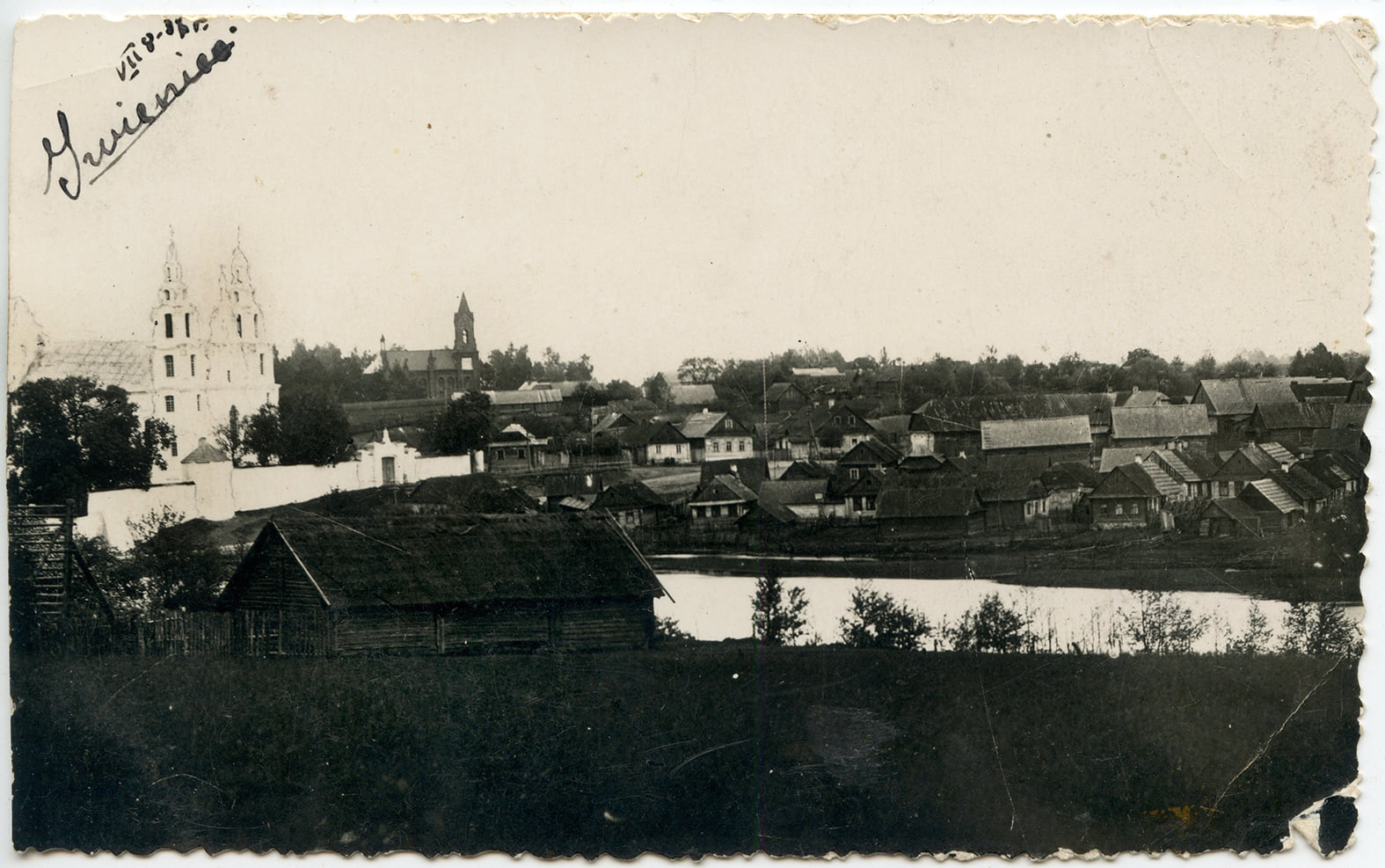 Беларуская (тарашкевіца): Івянец (Ivianiec), рака Волма (Vołma)